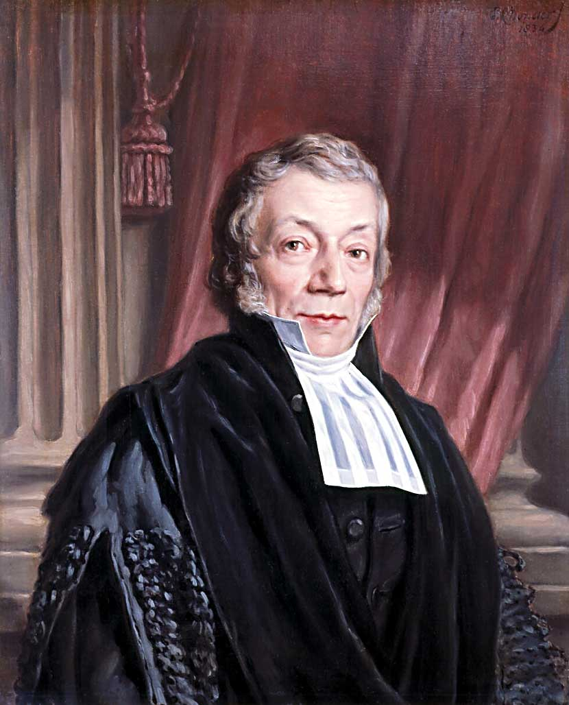 Janus Richardus de Brueys also: Jan Richard de Brueys (1778-1848), Dutch jurist